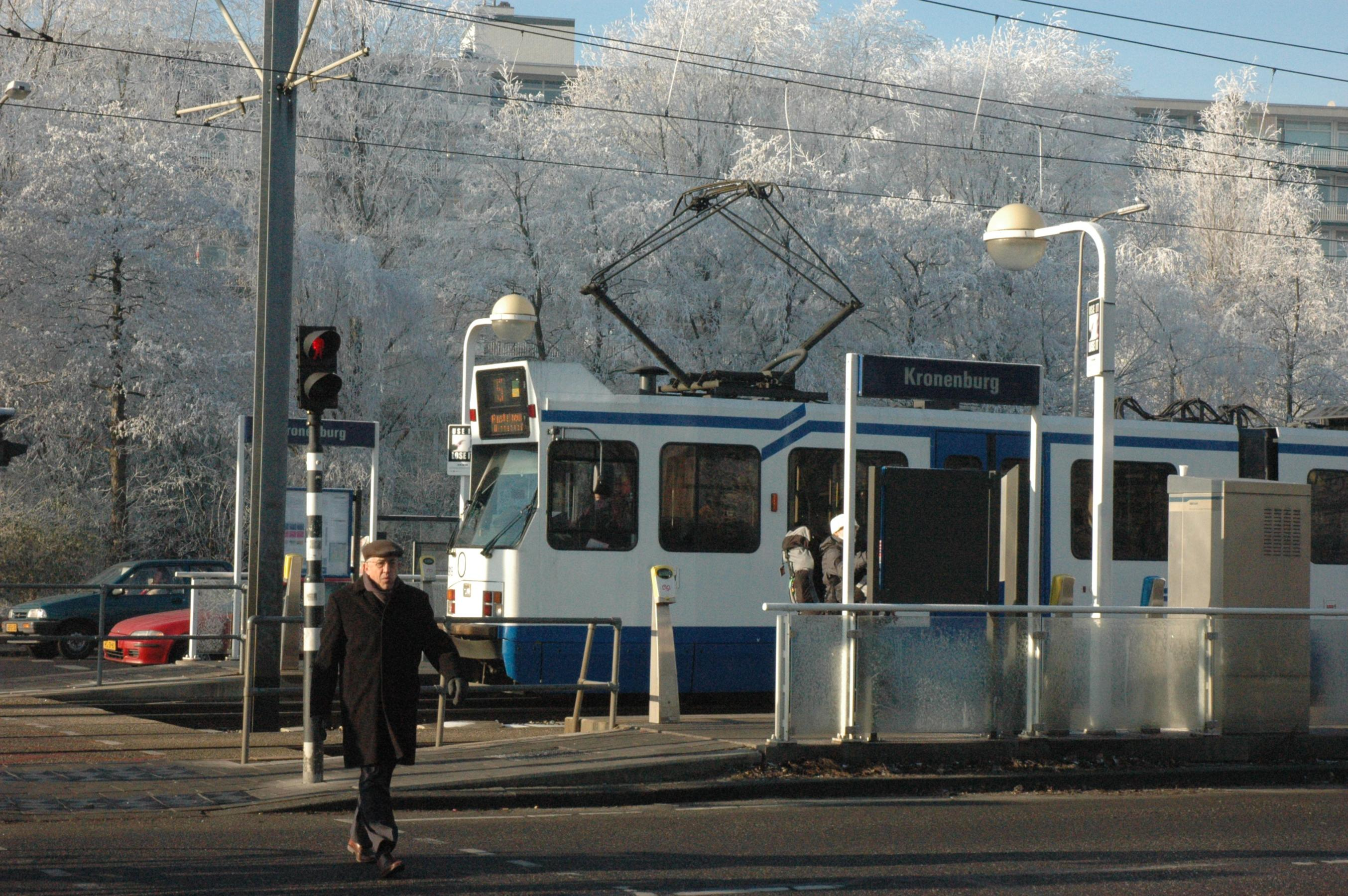 Amstelveen halte Kronenburg 22-12-07